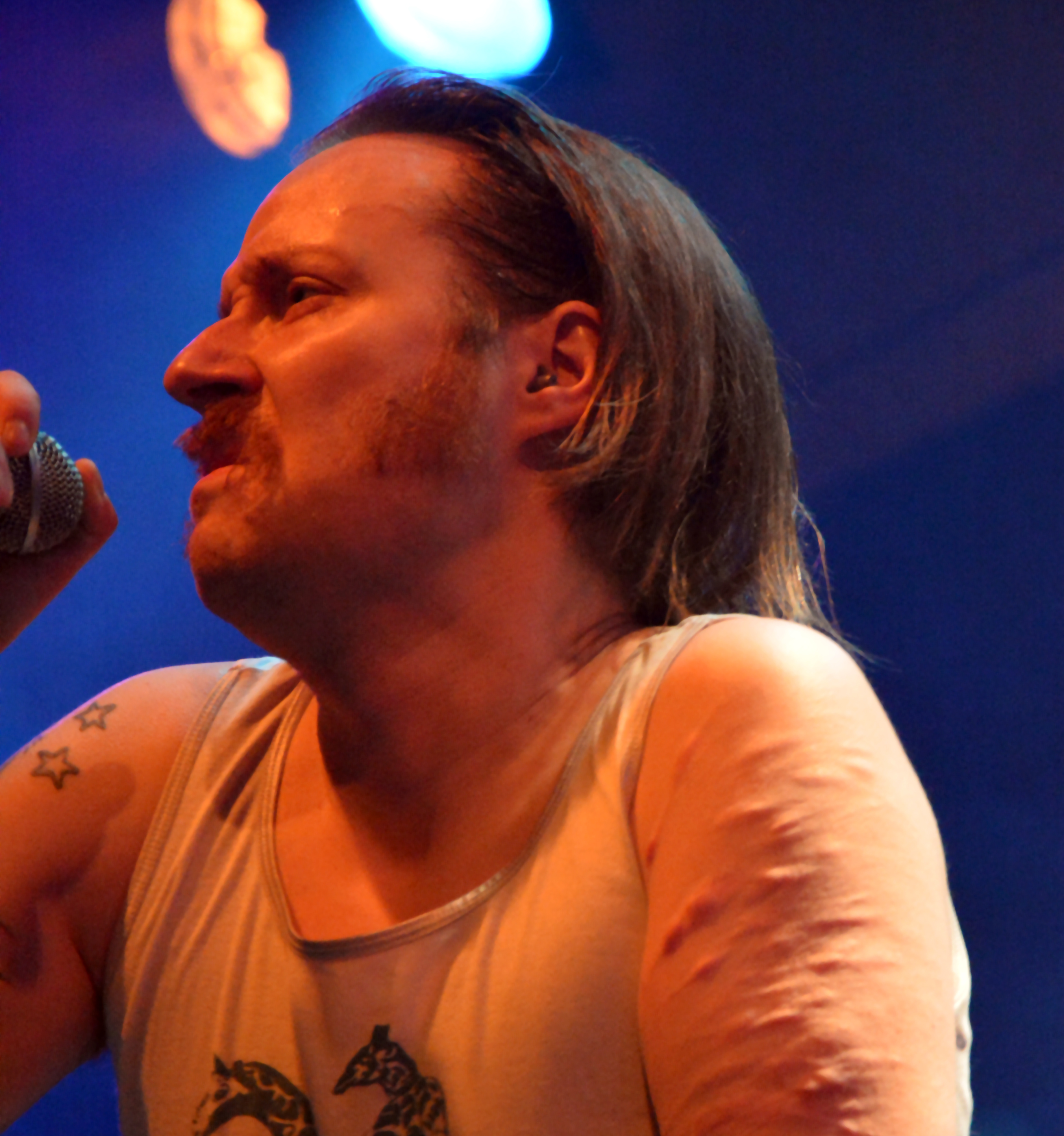 Fäulnis beim Heathen Rock Festivals 2014 im Rieckhof in Hamburg-Harburg